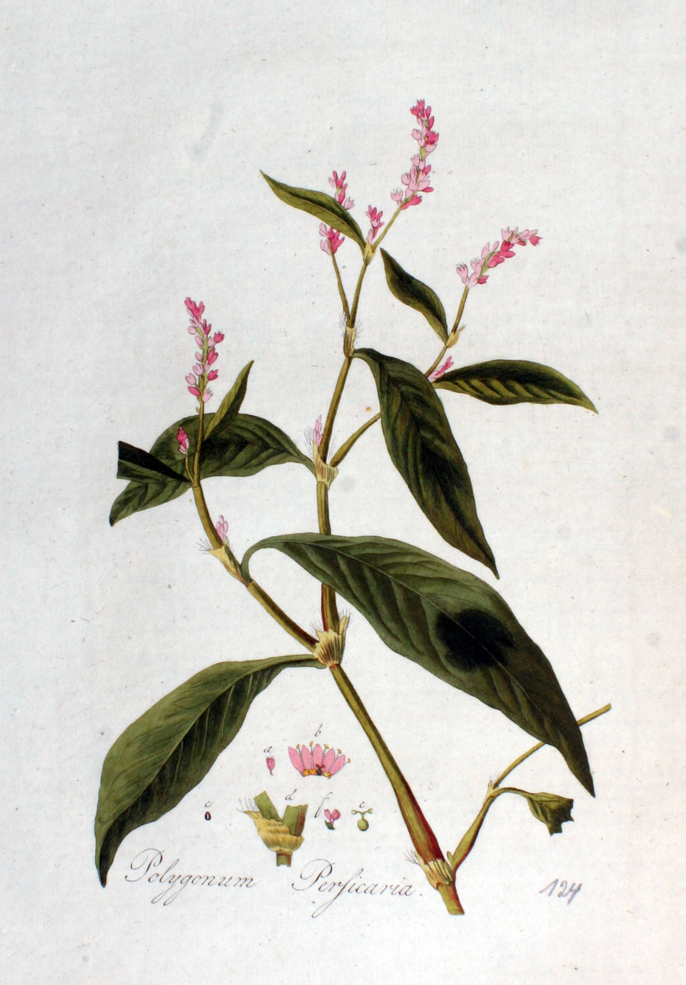 Persicaria maculosa S.F. Gray, nom. conserv. propos. (Syn. Polygonum persicaria L.)